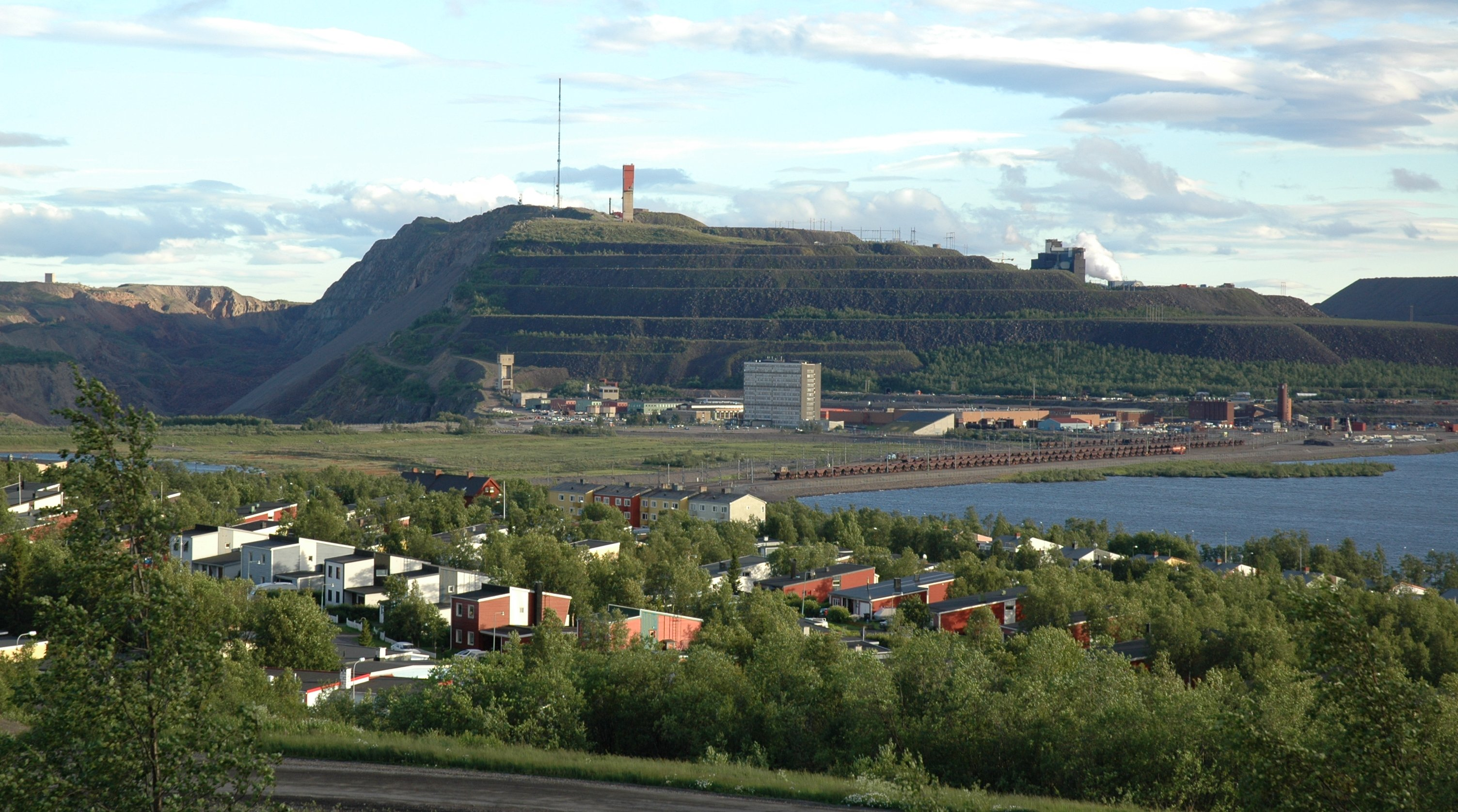 Kiirunavaara mountain photograped from Luossavaara